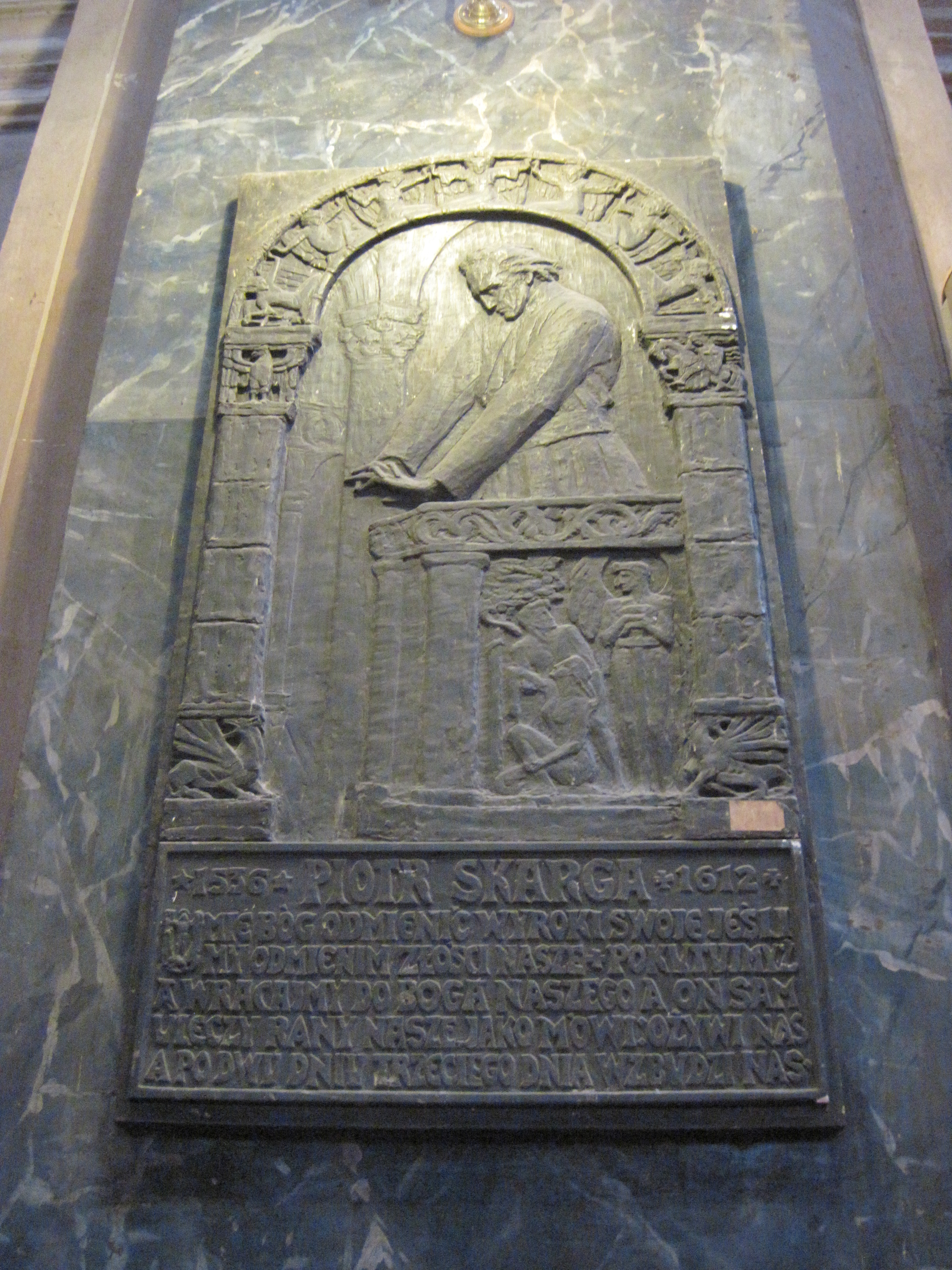 Пам. дошка П. Скарзі, Львів, єзуїти